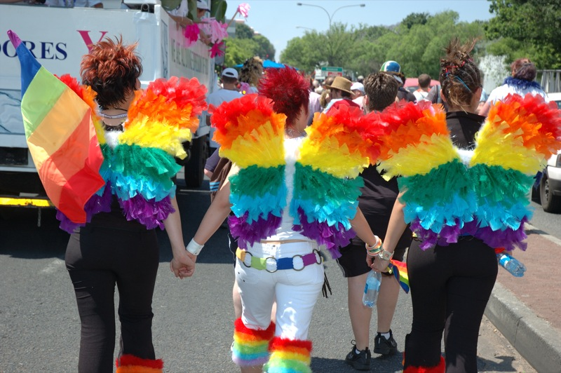 Lesbian Angels, Gay Pride Johannesburg 2006.